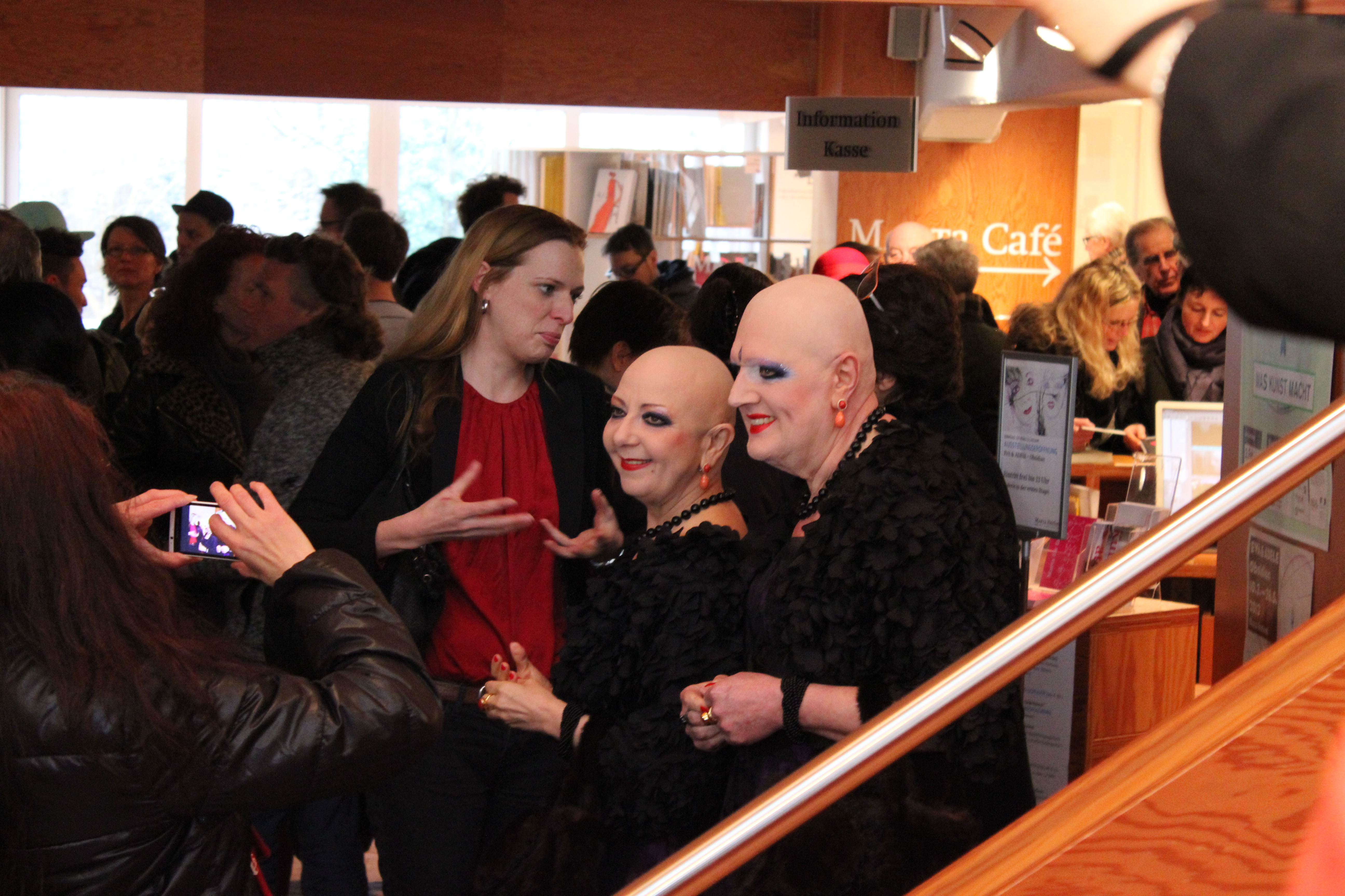 Das lebende Kunstpaar Eva und Adele (Berlin) bei der Eröffnung ihrer Ausstellung "Futuring" im MARTa Herford am 10.03.2013.